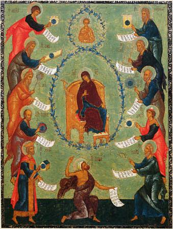 Praise to Virgin Mary (Похвала Пресвятой Богородице)